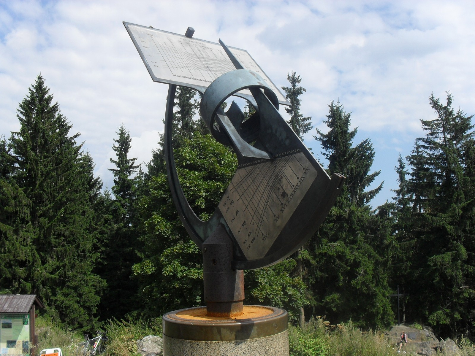 Fotky z mého výletu na Šumavskou Kleť